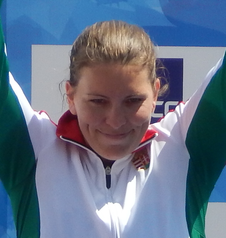 Венгерская двойка выигрывает серебро чемпионата Европы 2016